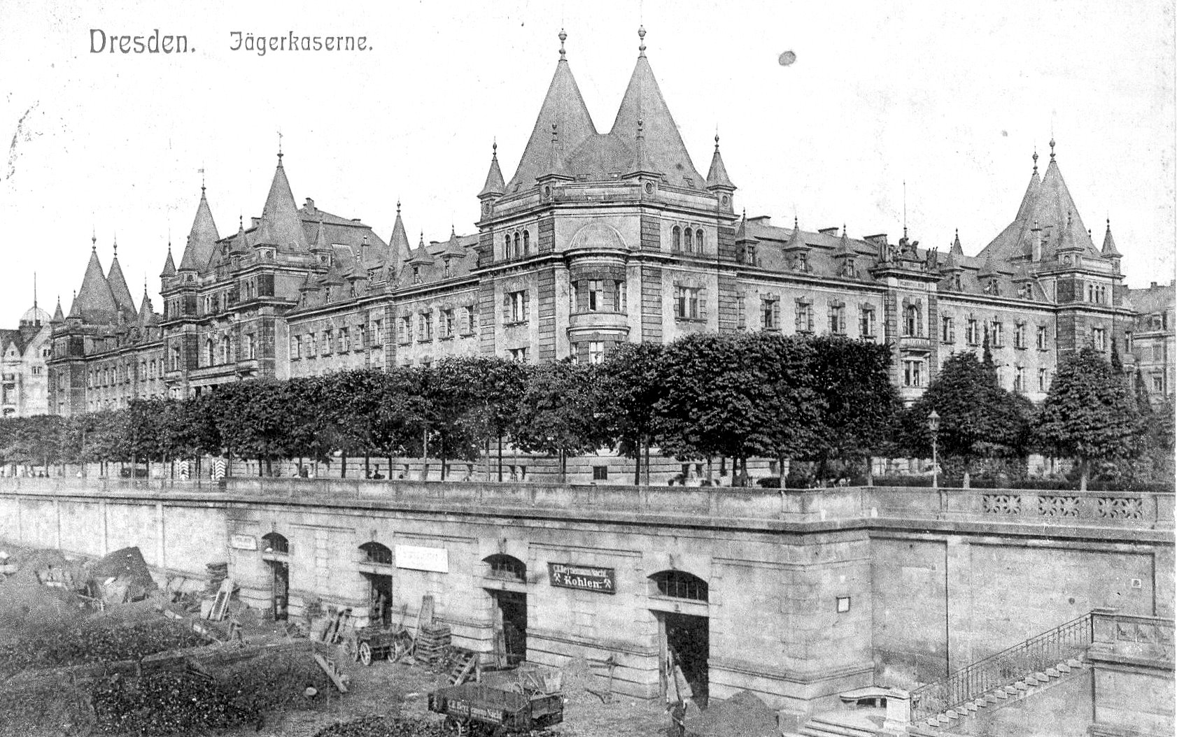 Dresden, Jäger-Kaserne in Johannstadt an der Elbe